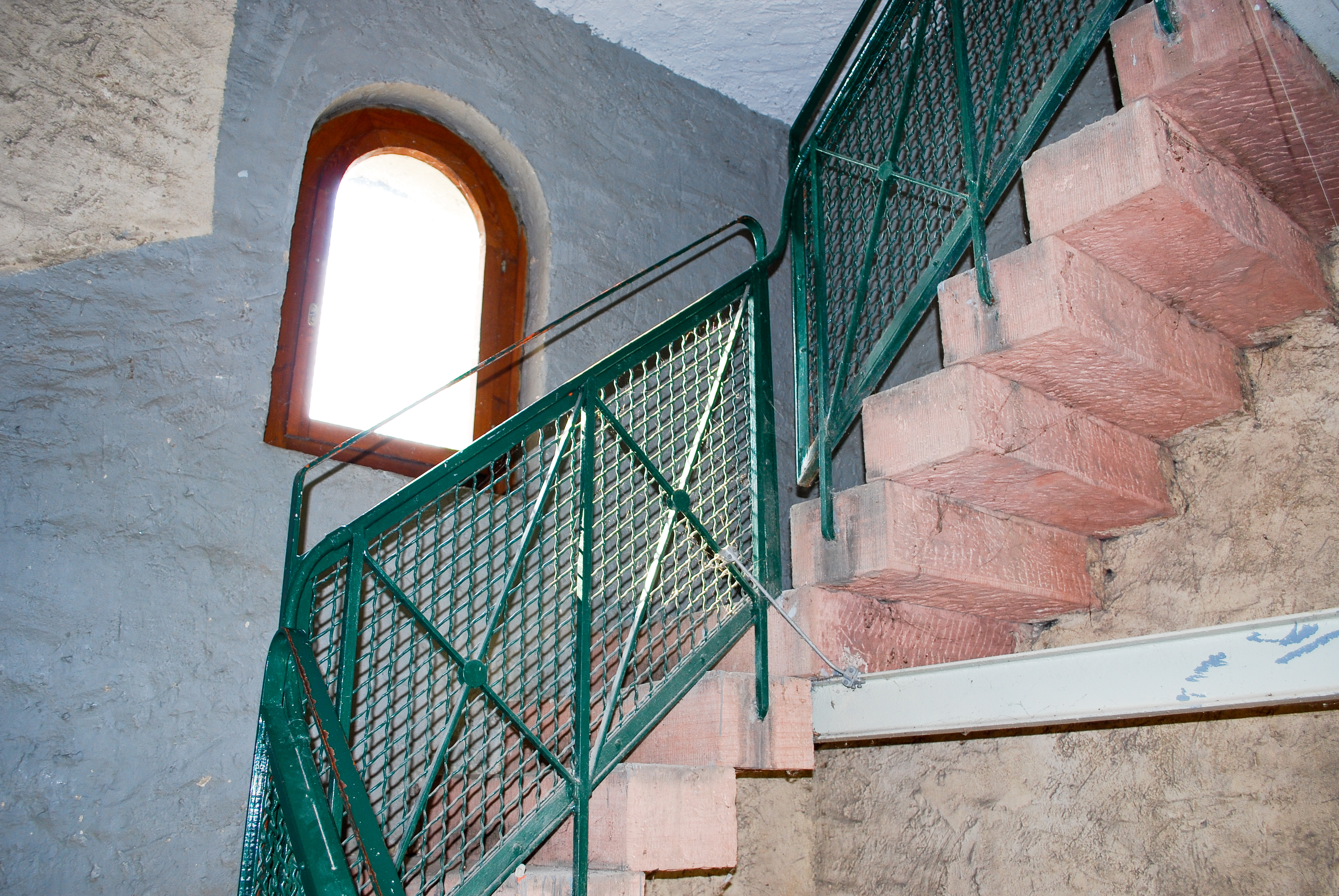 Der Treppenaufstieg des 24 Meter hohen Bieberer Aussichtsturmes in Offenbach-Bieber. Er wurde 1882 erbaut und ist von Anfang Mai bis Ende Oktober an Sonn- und Feiertagen geöffnet.